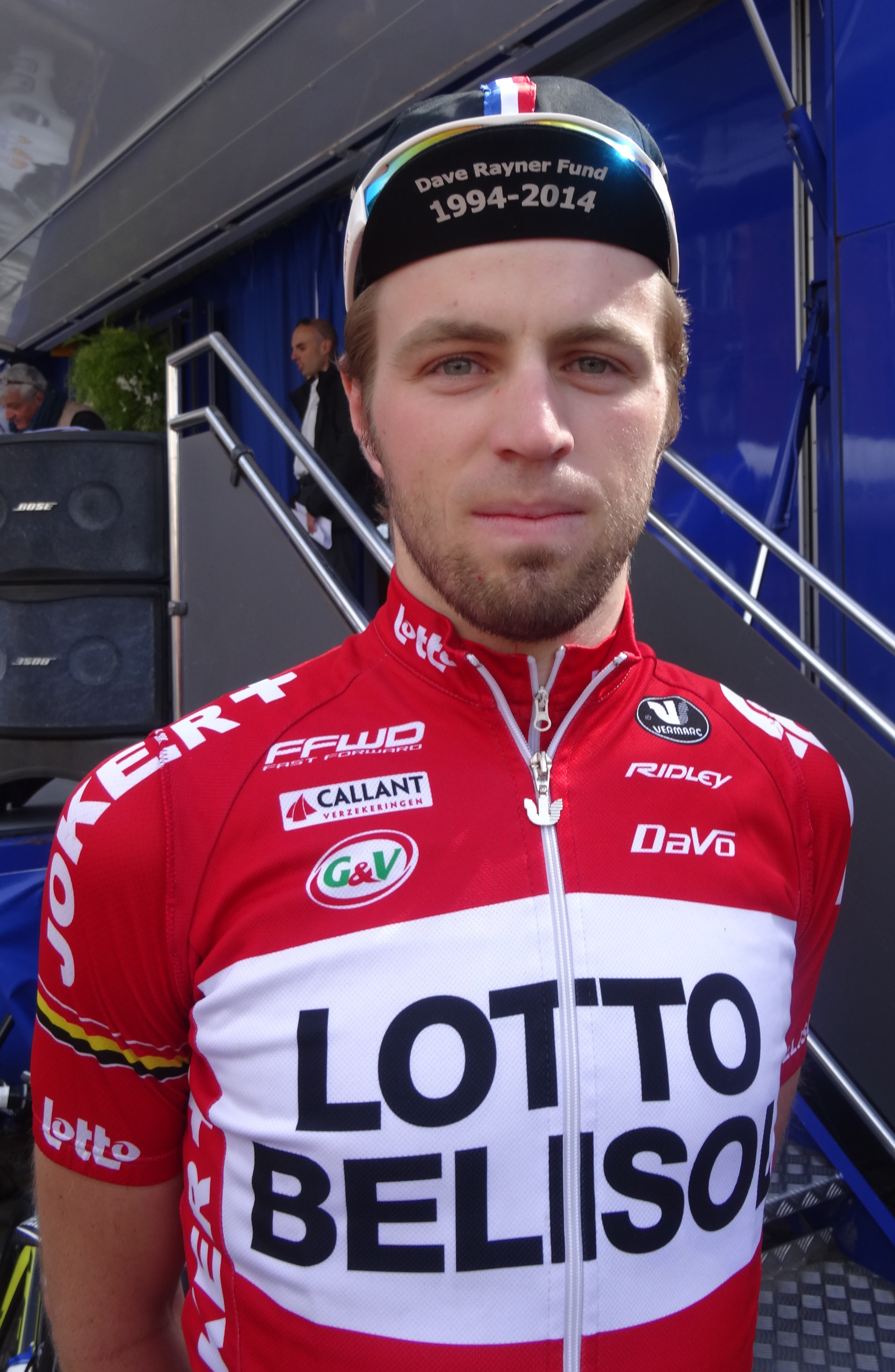 Reportage photographique réalisé le dimanche 25 mai 2014 à l'occasion du départ et de l'arrivée de la troisième étape du Paris-Arras Tour 2014 à Arras, Pas-de-Calais, Nord-Pas-de-Calais, France. Depicted person: Daniel McLay Depicted team: Lotto-Belisol U23